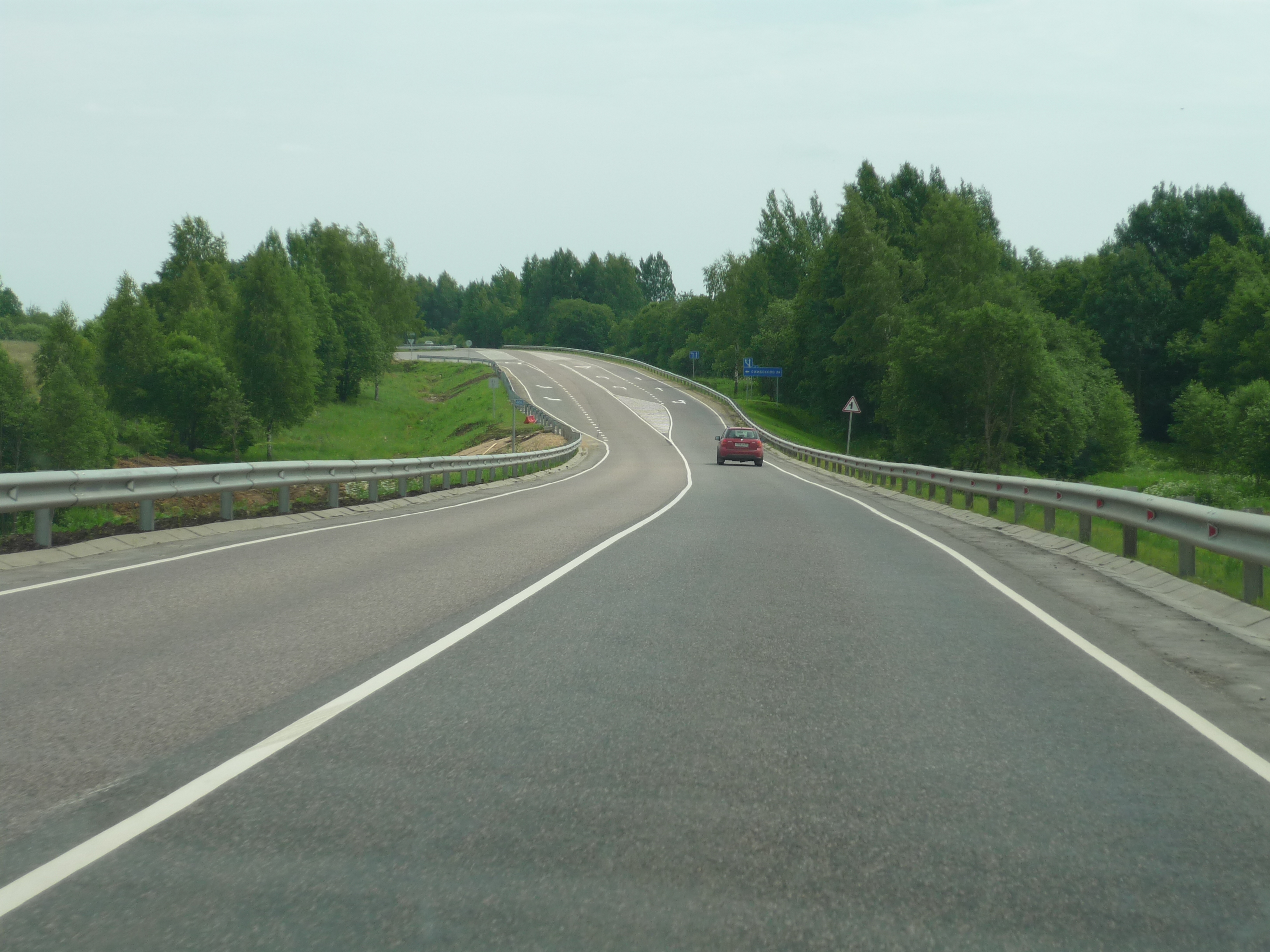 Трасса М9 в Зубцовском районе